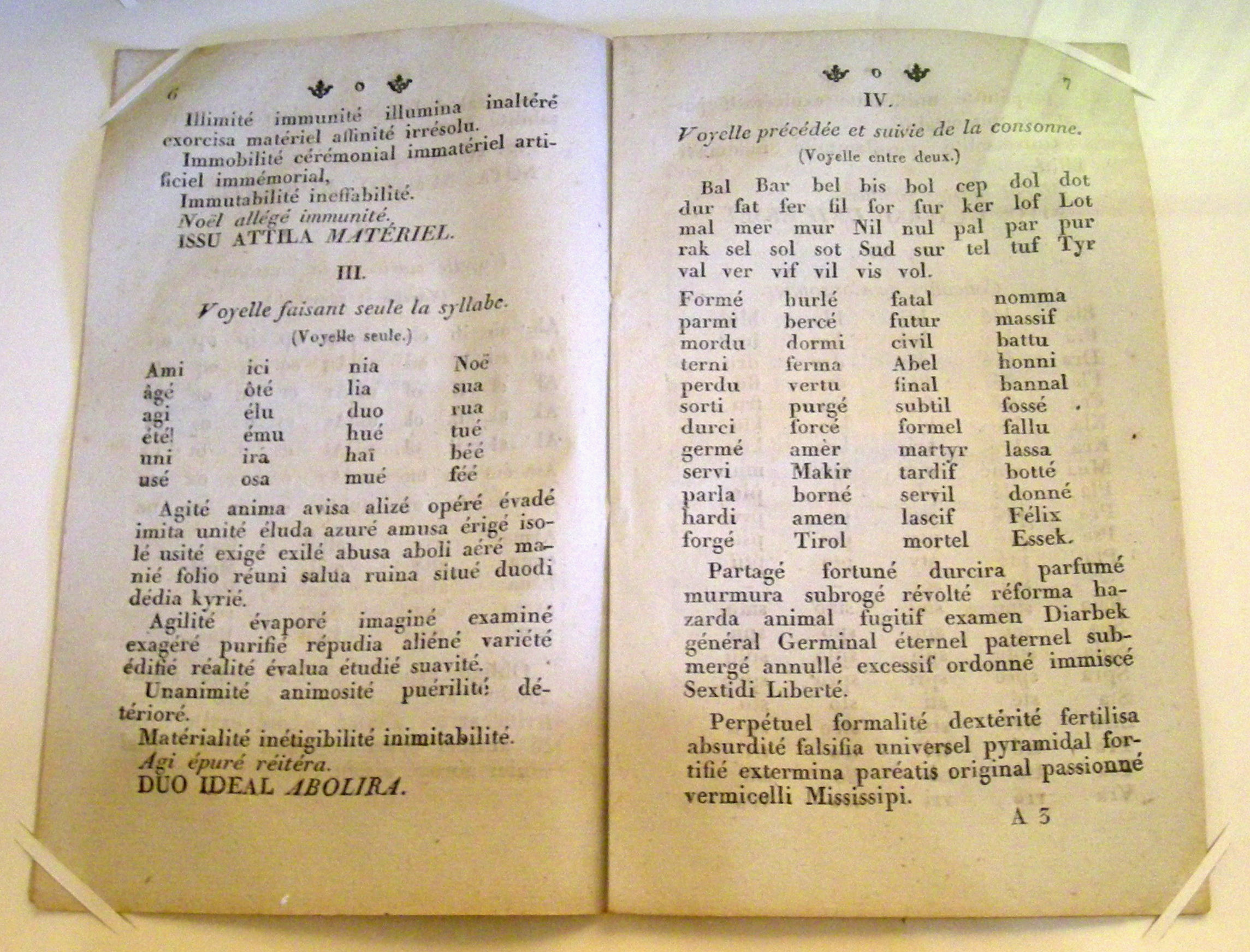 Méthode d'apprentissage de la lecture conçue par le pasteur Jean-Georges Stuber (1762)